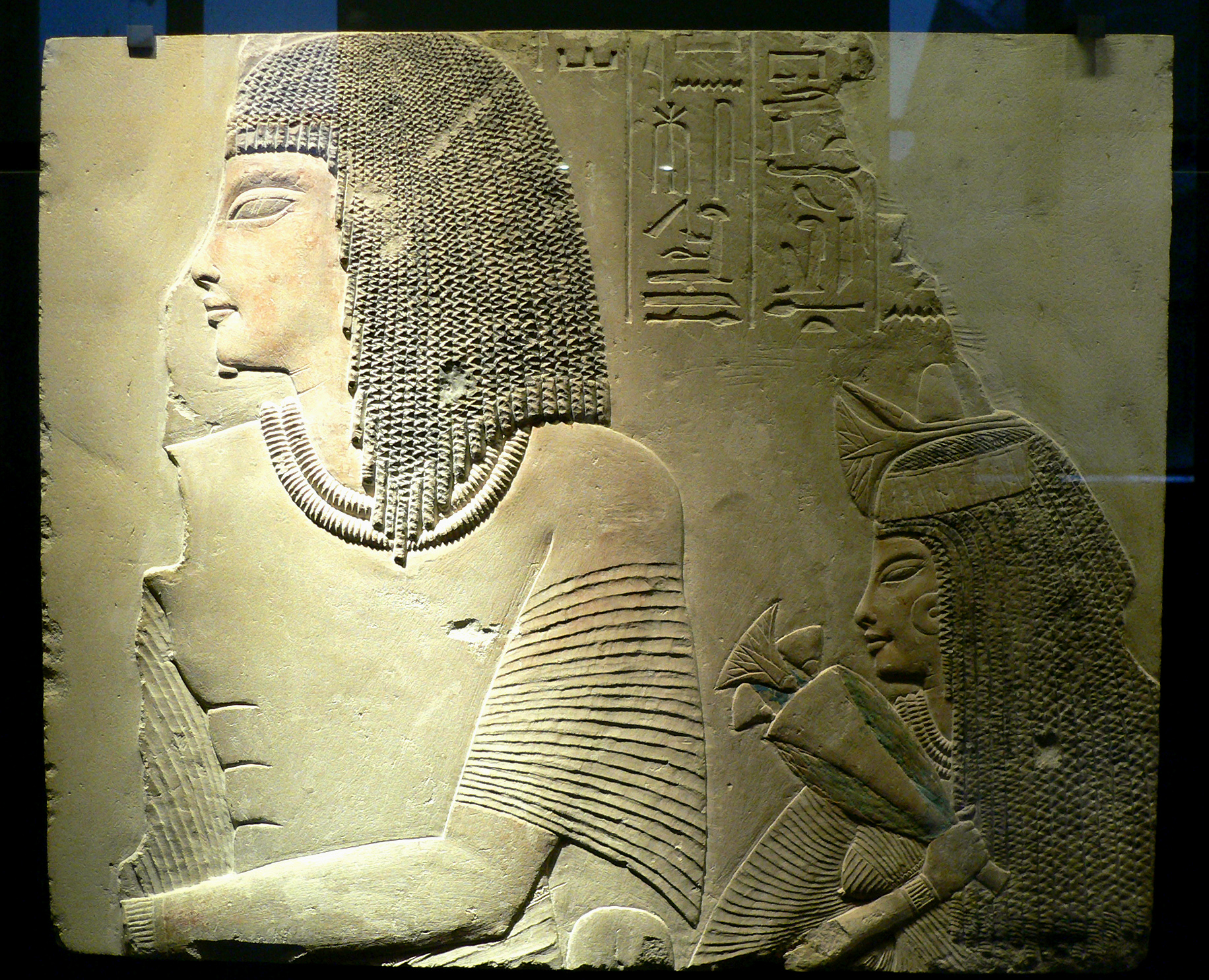 Relief représentant Amenmosé et sa femme Depet, fin de la 18e dynastie, Nouvel Empire (provenant de Saqqarah)